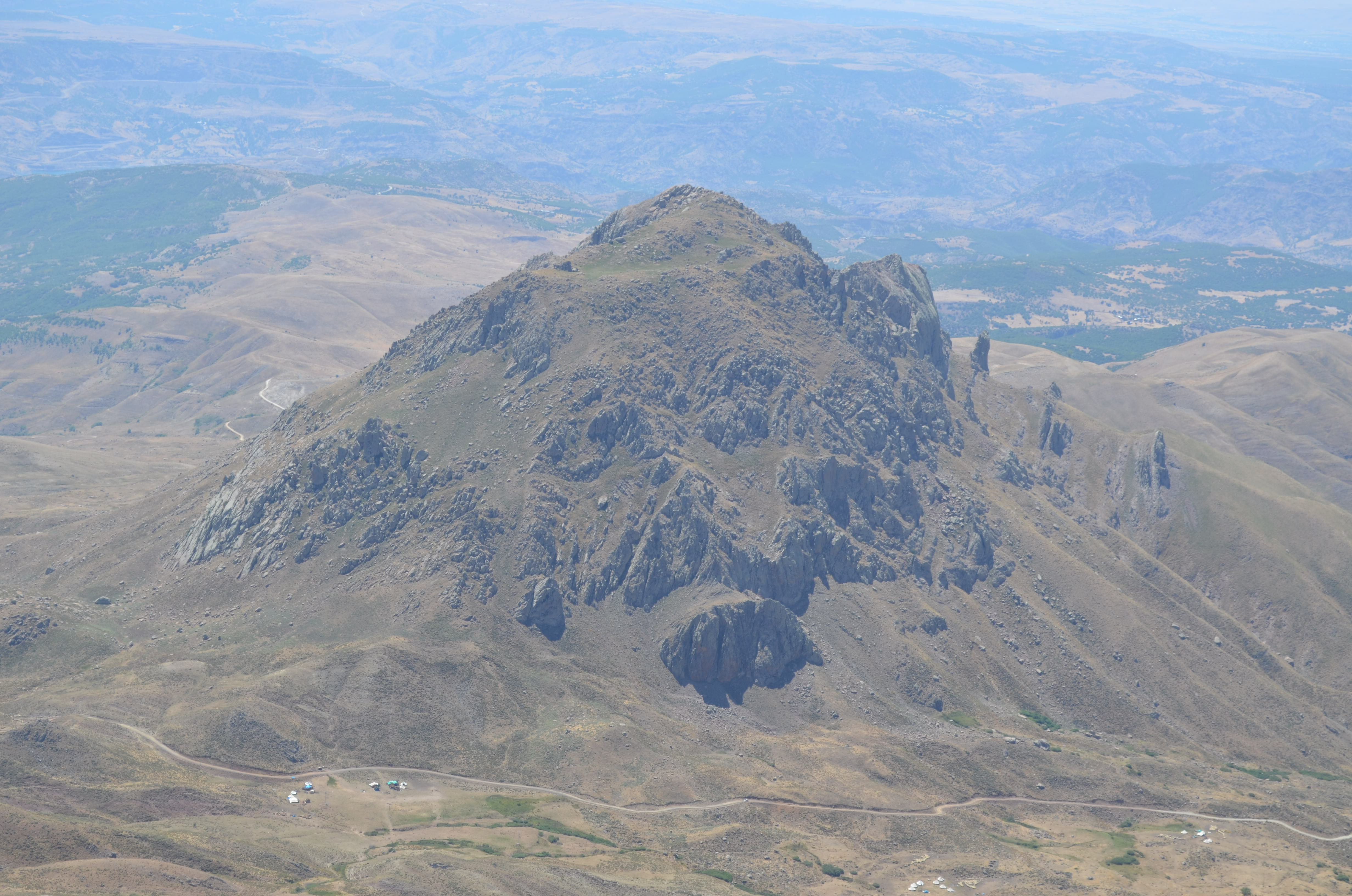 Dağın karşısındaki Tari dağı.